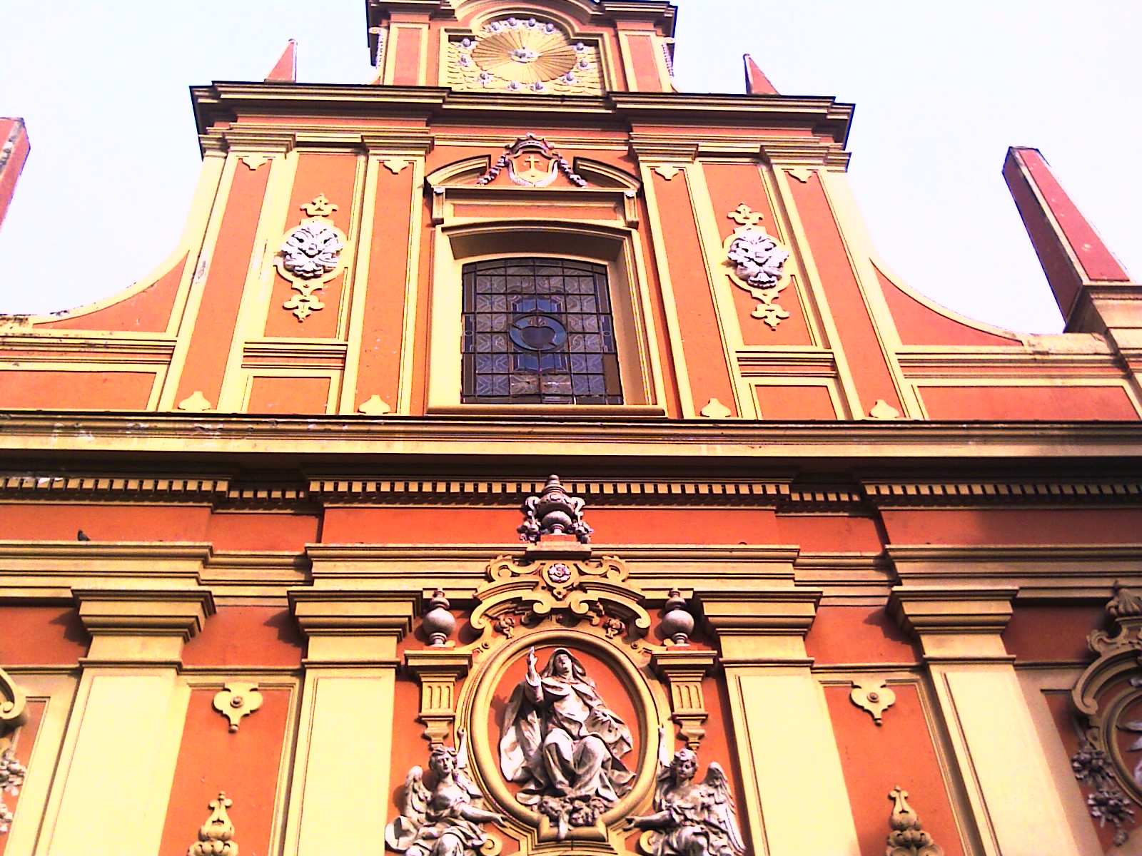 Partcolare